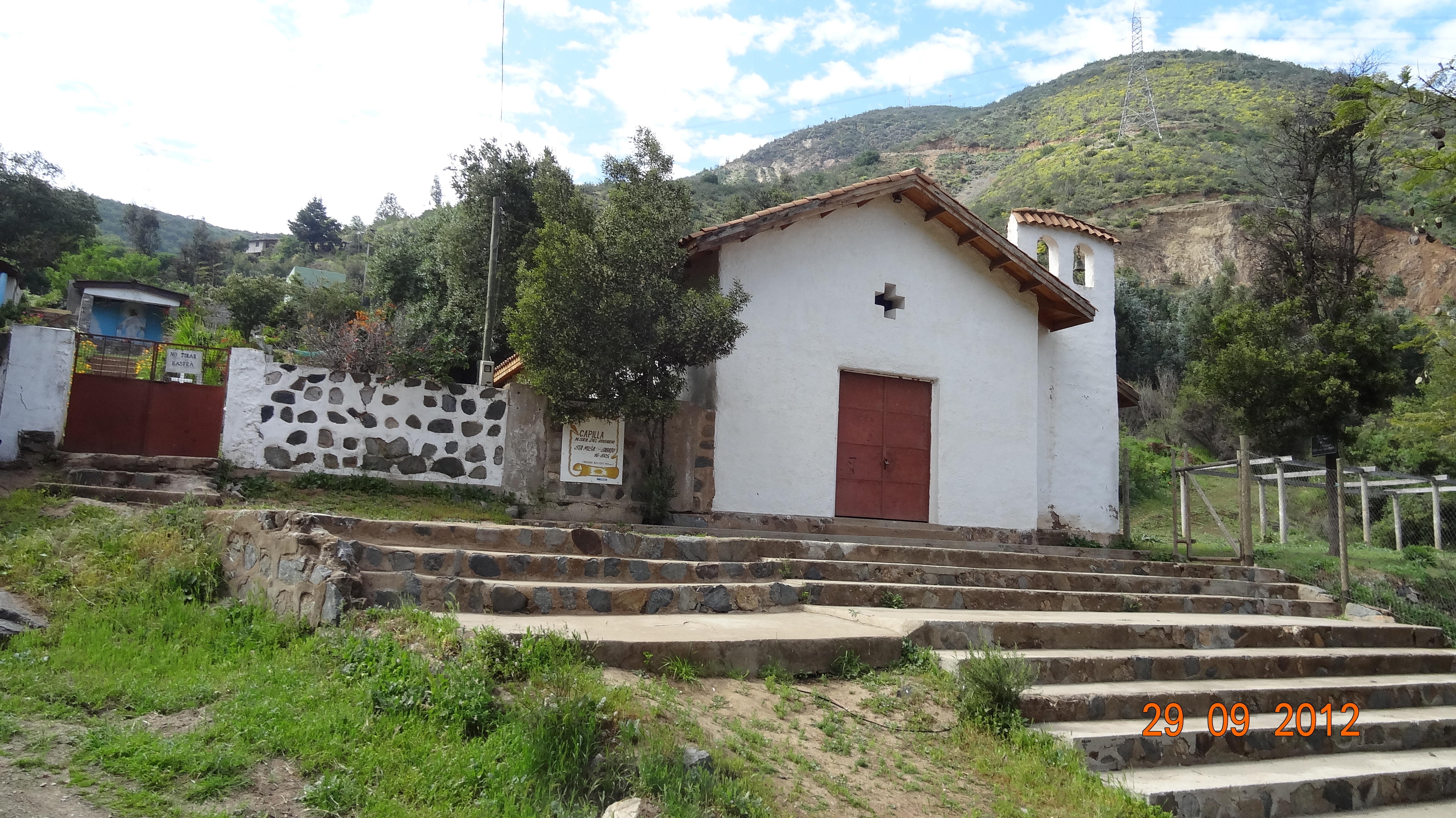 Capilla de La Dormida. Enfrente de lafachada principal se aprecia una extensa gradería en piedra que accede al cementerio y la capilla. This is a photo of a national monument in Chile: 758